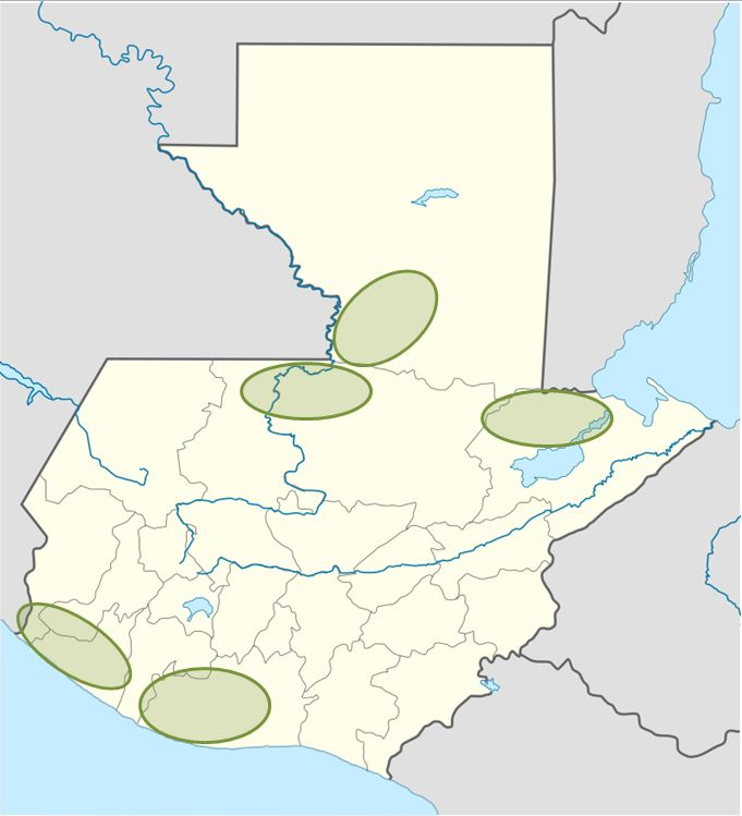 Areas en donde se cultiva palma Africana en Guatemala en 2014. Fuente: Luis Solano, Enfoque, N. 36, 15 de Julio de 2015